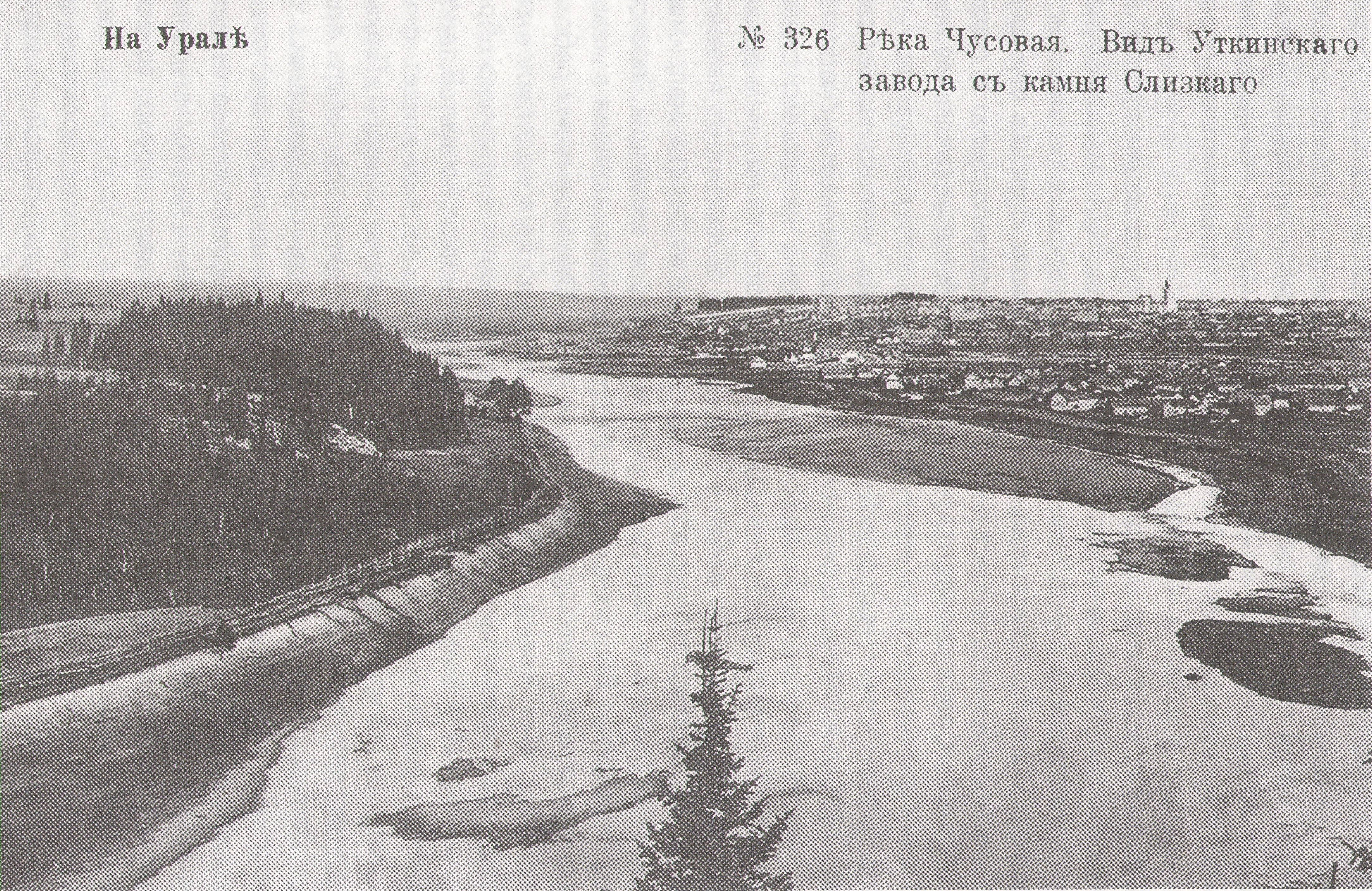 Метенков В.Л. Староуткинский Завод с камня Слизкий, 1893